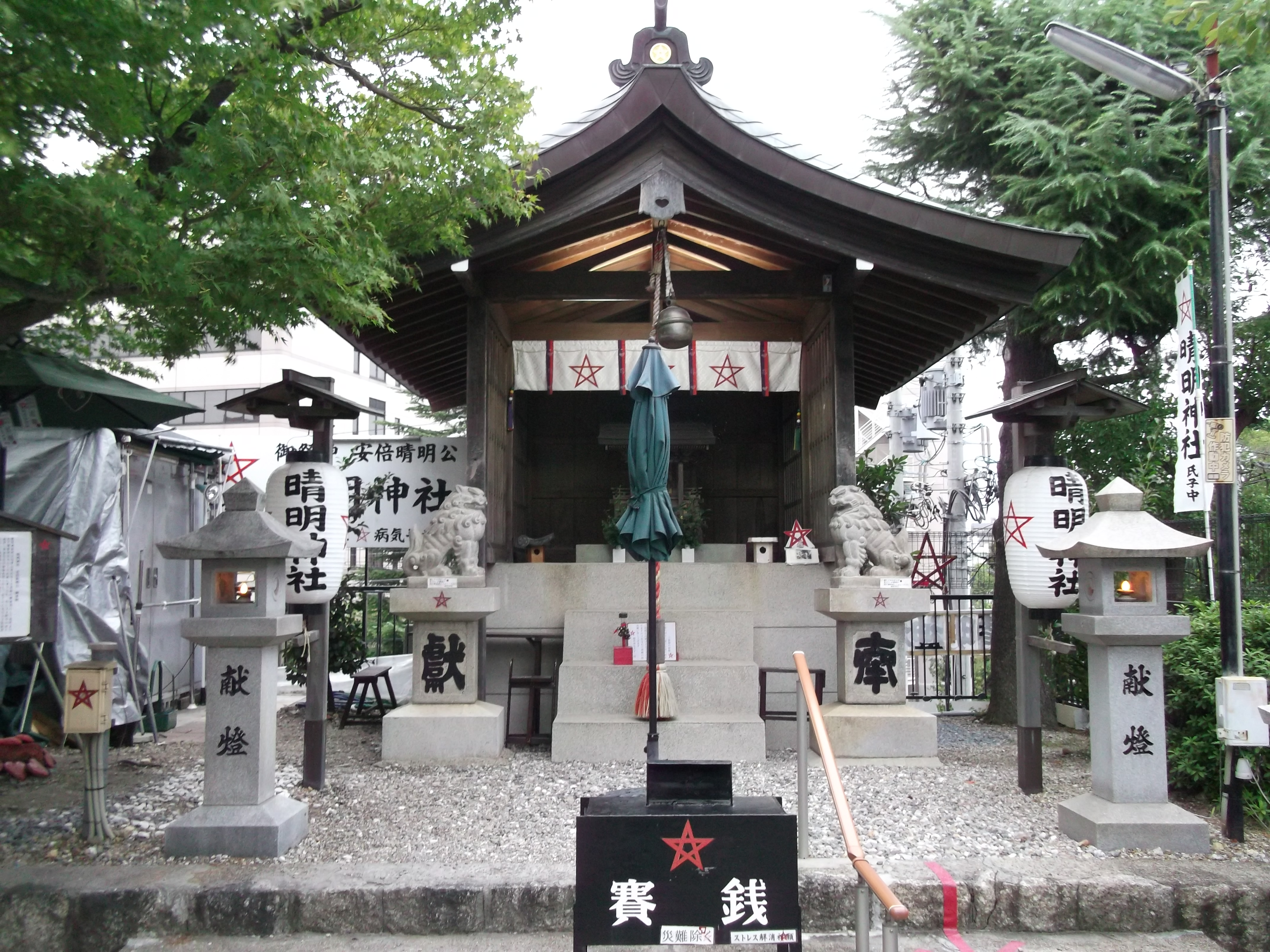 名古屋市千種区清明山に鎮座する名古屋晴明神社本殿